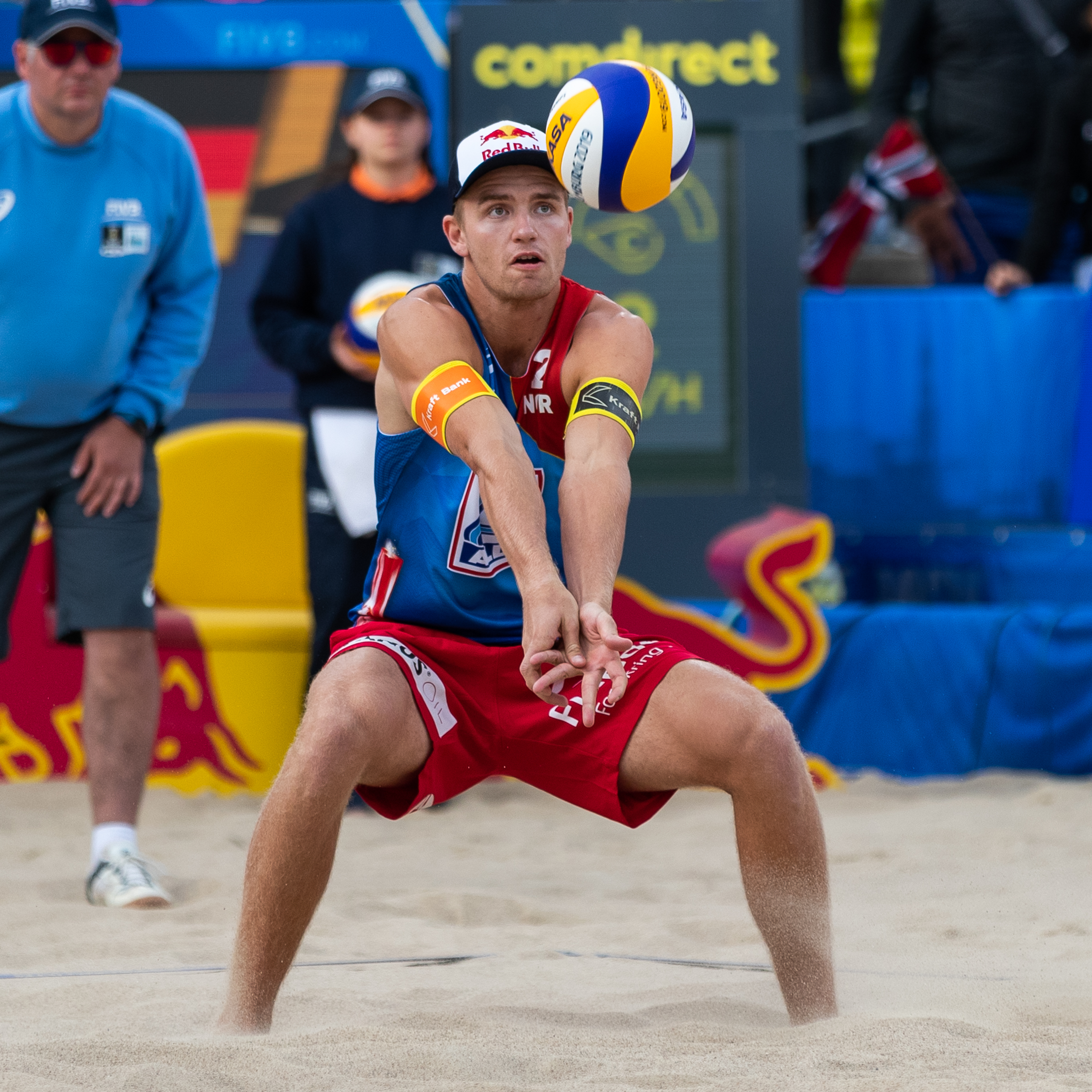 BeachVolleyball Weltmeisterschaft Hamburg 2019; Christian Sandlie Sorum (NOR, Norwegen)